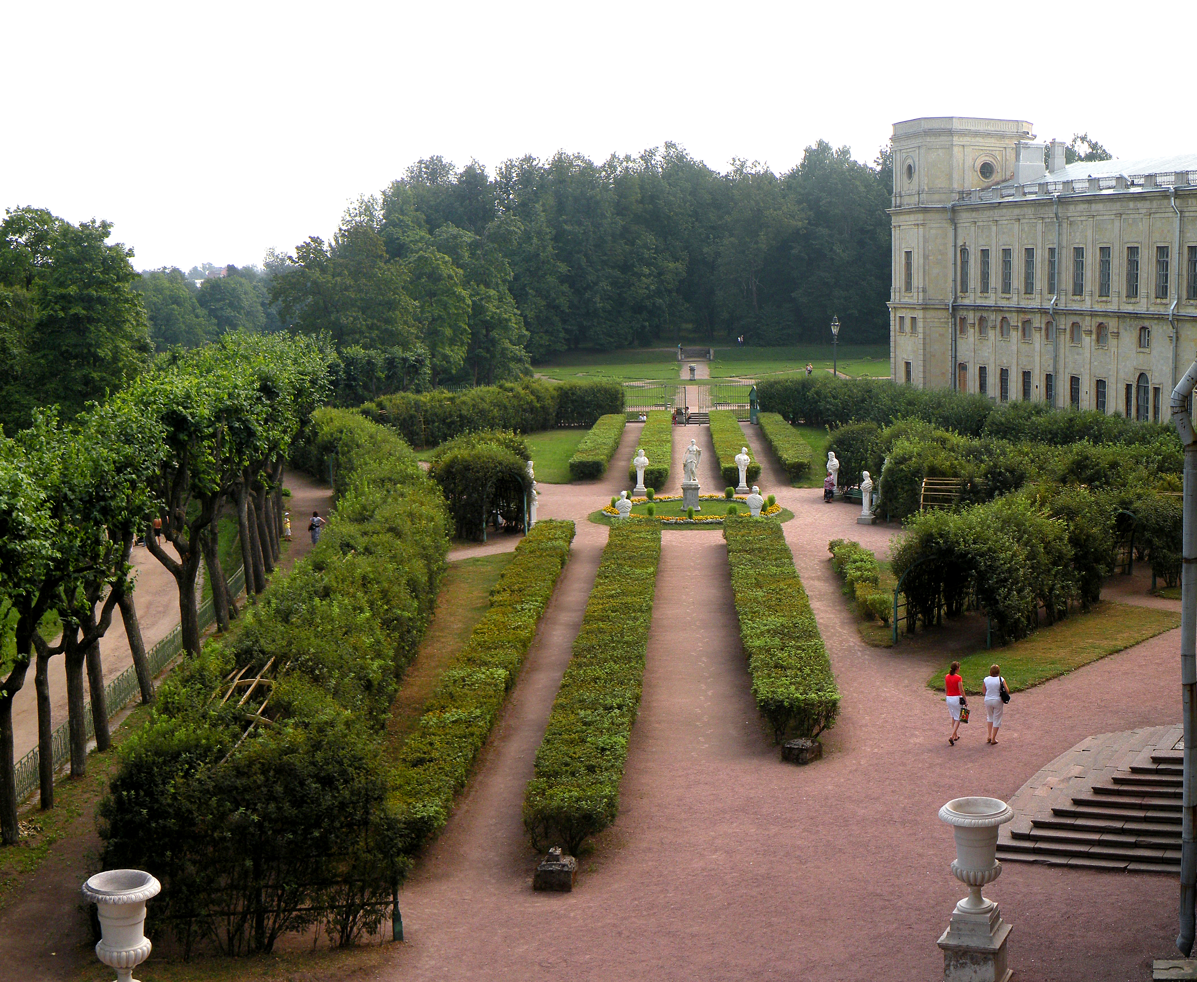 Вид на Собственный сад из башни Большого Гатчинского дворца